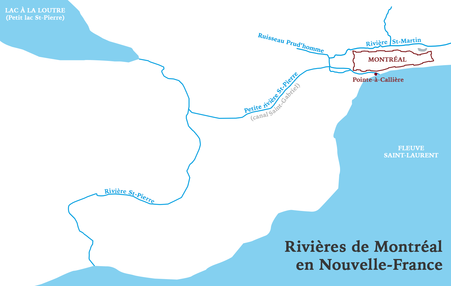 Ruisseaux près des fortifications de Montréal au 18e siècle.